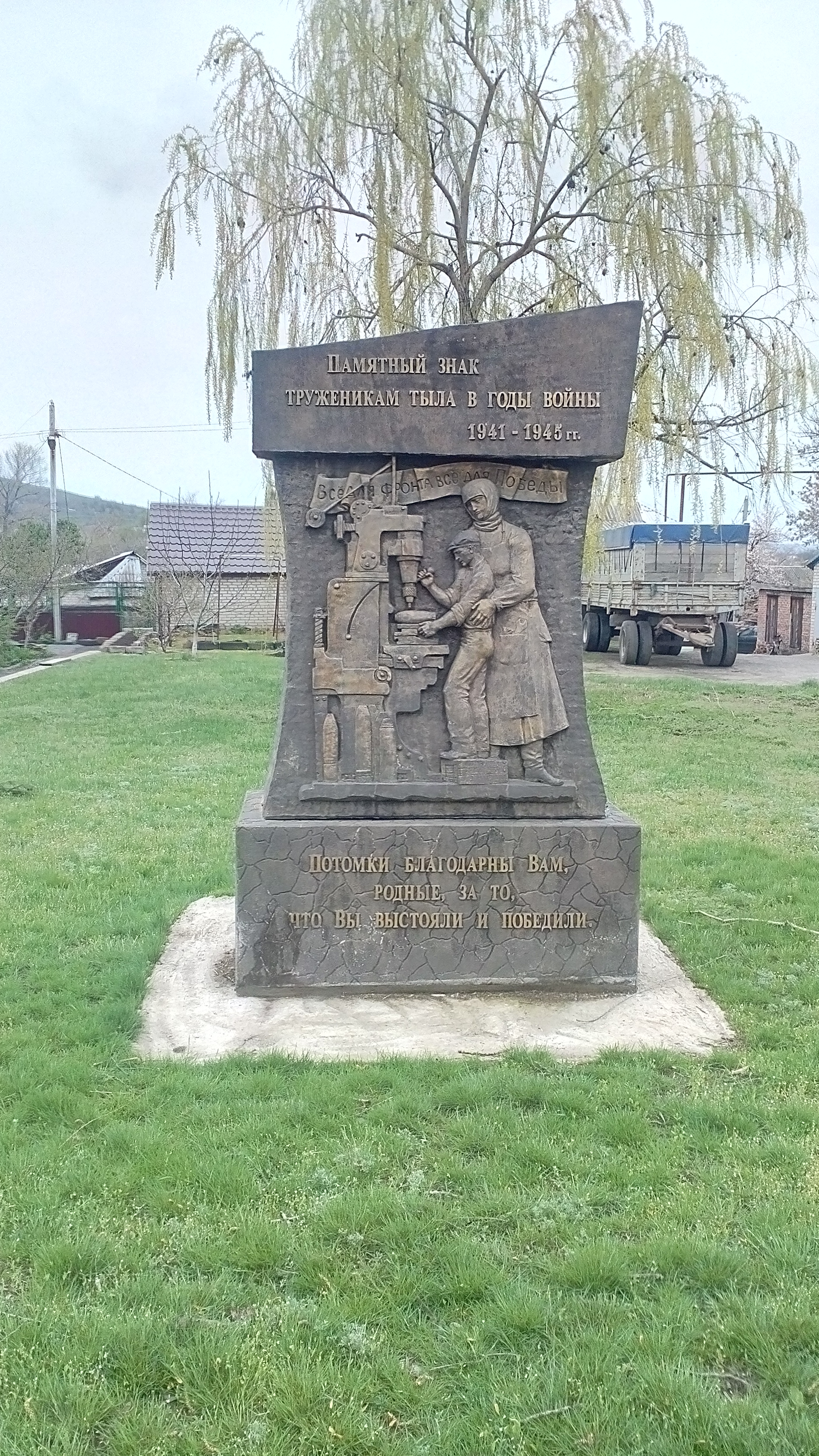 Белая Калитва: памятник труженикам тыла Великой Отечественной войны